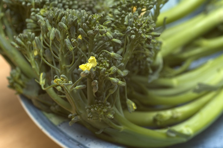 Broccolini (Brassica oleracea var. Alboglabra X Brassica oleracea var. Italica)